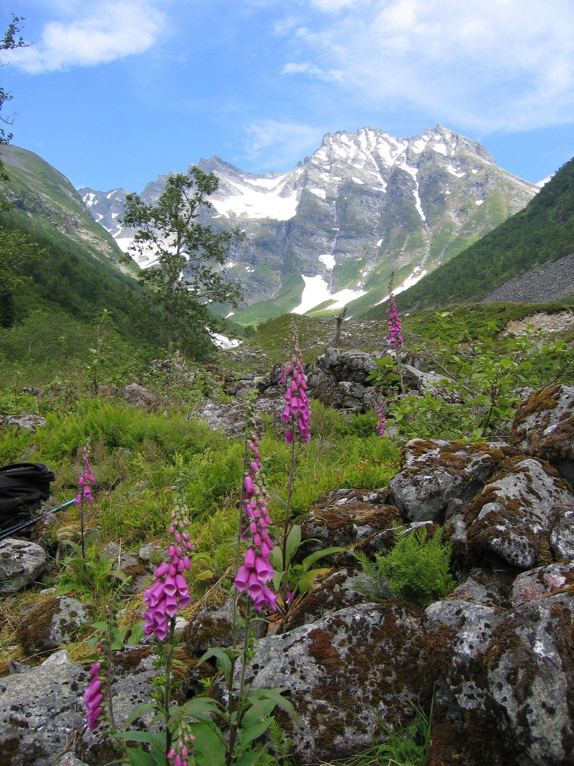 Urkedalstinden,Ørsta,Møre og Romsdal